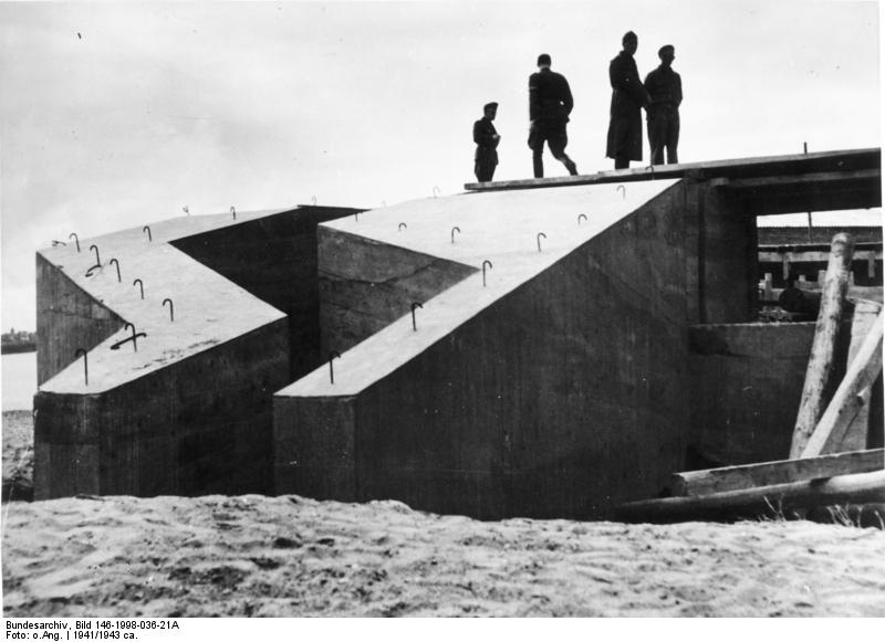 Unüberwindlicher Wall am Atlantik In nimmerruhender Arbeit schufen die Männer der O.T. jenen gewaltigen Wall an Europas Westküste, an dem jeder feindliche Angriffsversuch zerschellen wird. Einer der unzähligen Bunker, die dicht an dicht die ganze lange Küste umsäumen.